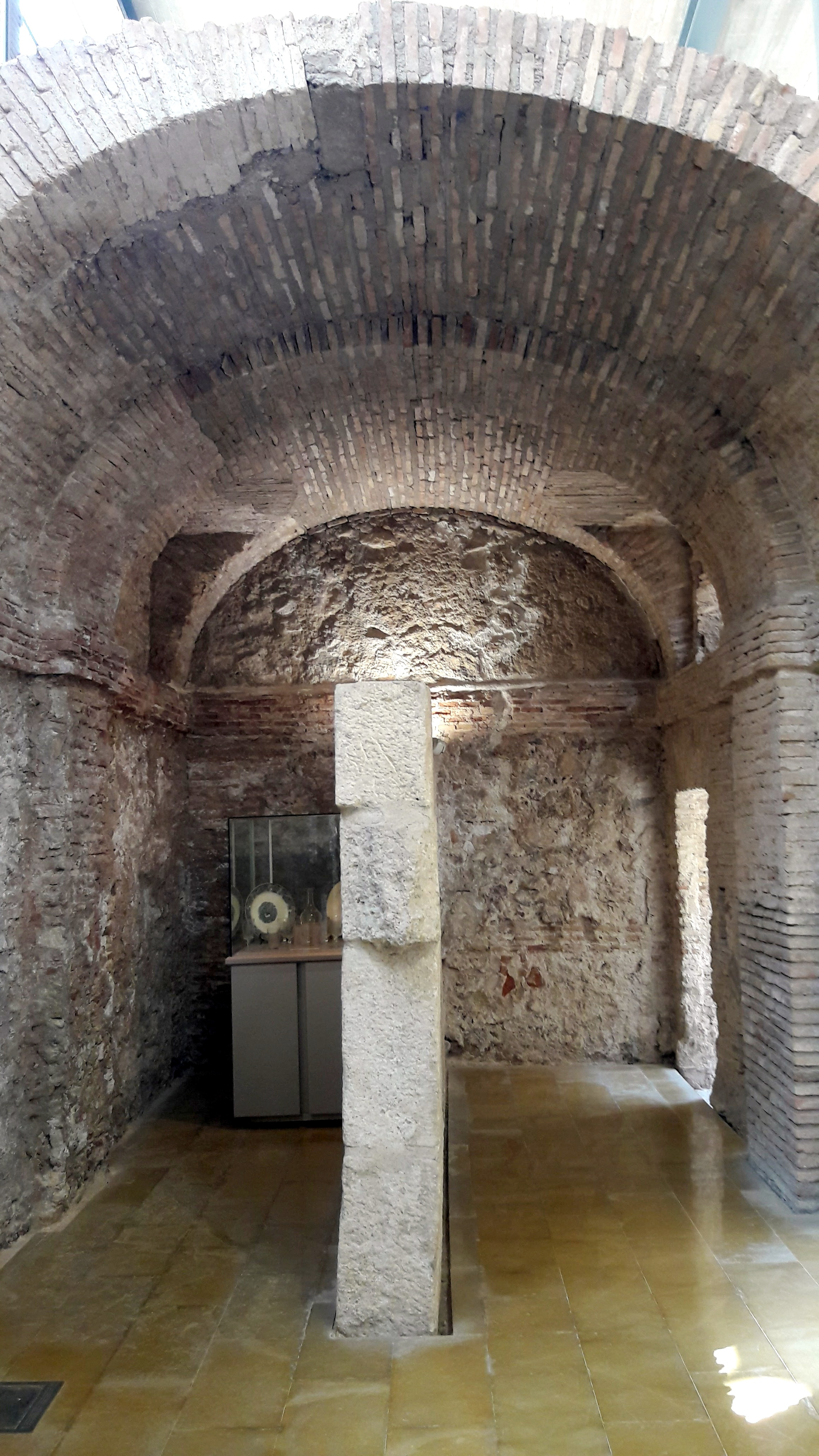 Museo Arqueológico Los Baños-zona común